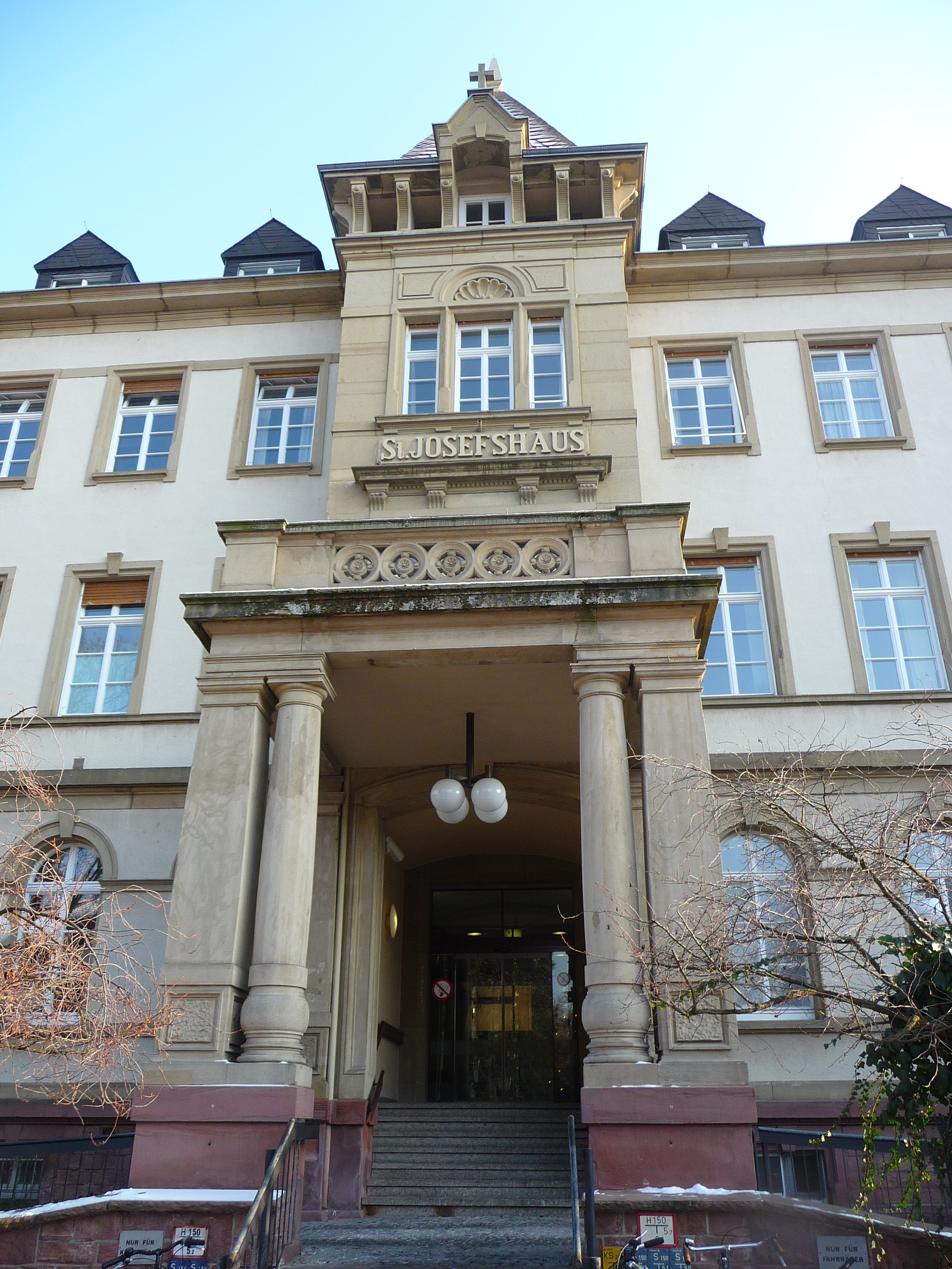 Heidelberg (Weststadt)- Krankenhaus St. Josef, Haupteingang (Westseite)